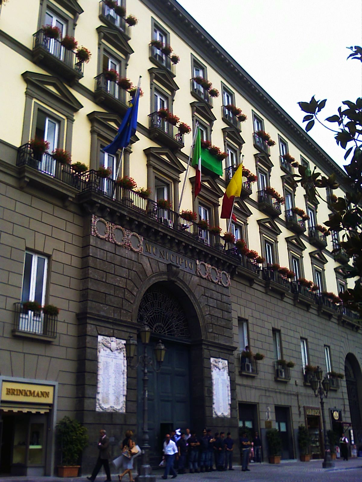 Scorcio